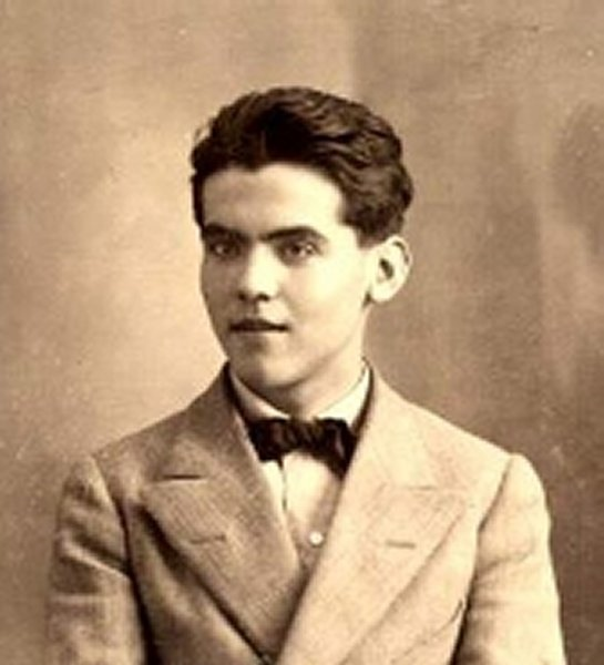 Federico García Lorca en 1914. Foto anónima hallada en la Universidad de Granada en 2007, proveniente de una ficha de estudiante.